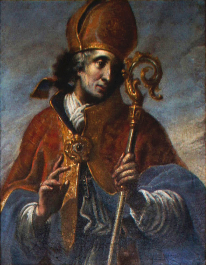 Porträtgemälde von Wildgraf Emicho, Fürstbischof von Freising, im Fürstengang zwischen Fürstbischöflicher Residenz und Freisinger Dom.